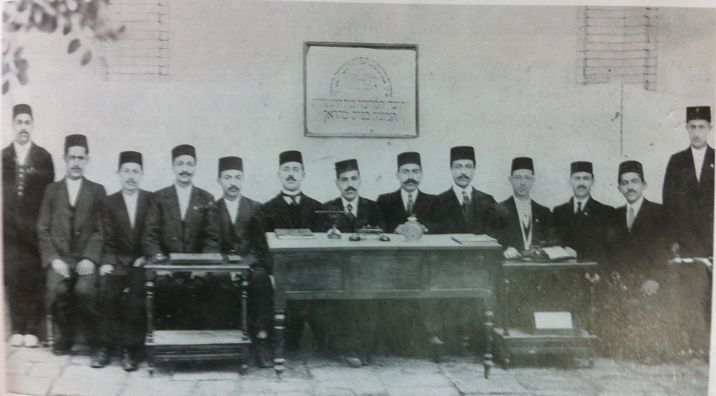 The Zionist Organization of Iran (ha-Histadrut ha-Ṣiyyonit be-Paras) , Teheran, 1919. Shemu'el Haim (third from the left), Soleyman Kohan Ṣedq (seven from the left), Dr. Ayyūb Loqmān Nehūrāy (eight from the eft), Dr. Habib Levy (nine from the left)